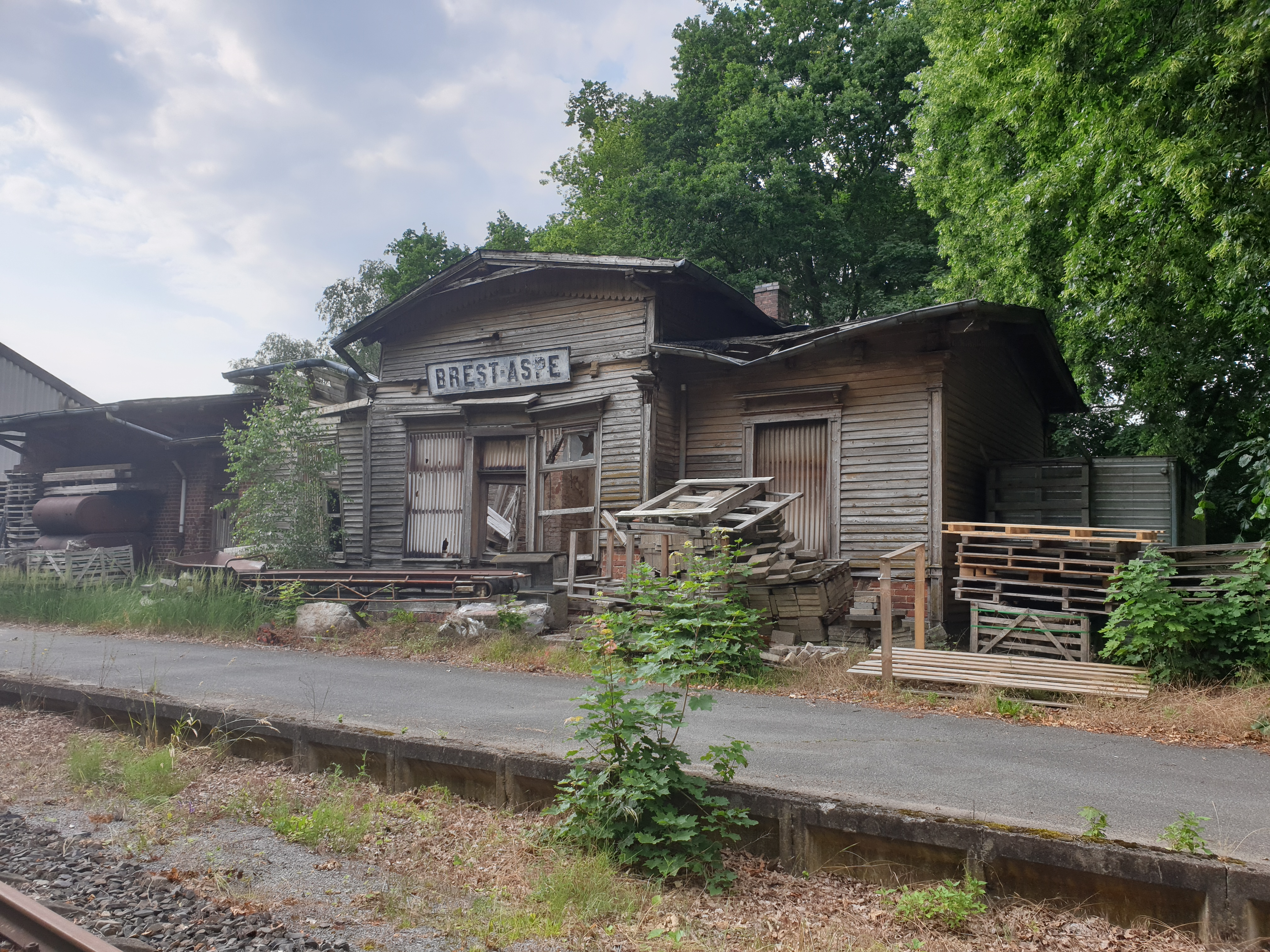 Verfallenenes Bahnhofsgebäude am Bahnhof in Brest-Aspe, Landkreis Stade, Nds.